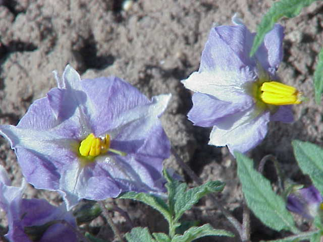 Species: Solanum spegazzinii Family: Solanaceae Image No. 4